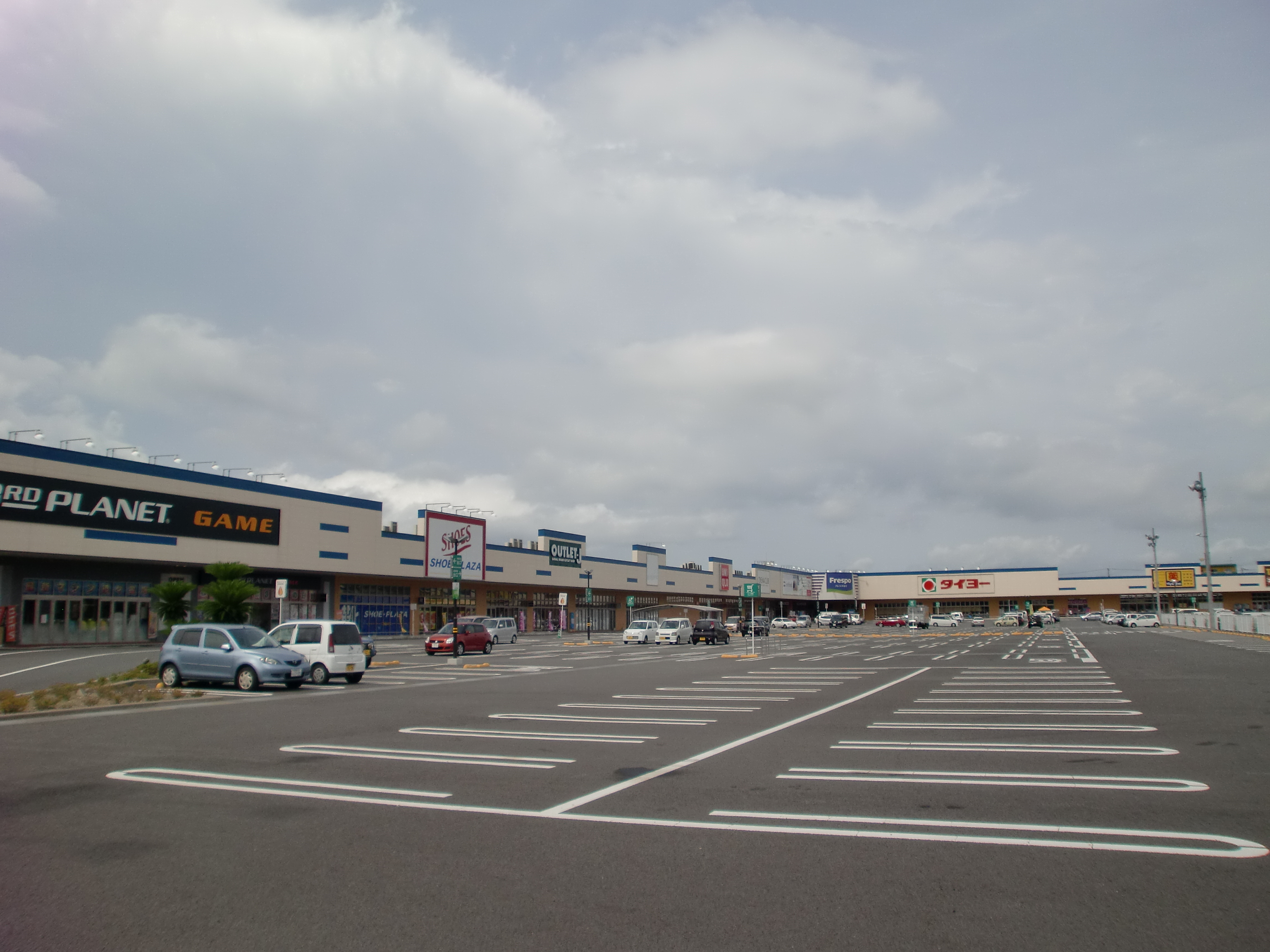 フレスポ国分の外観。